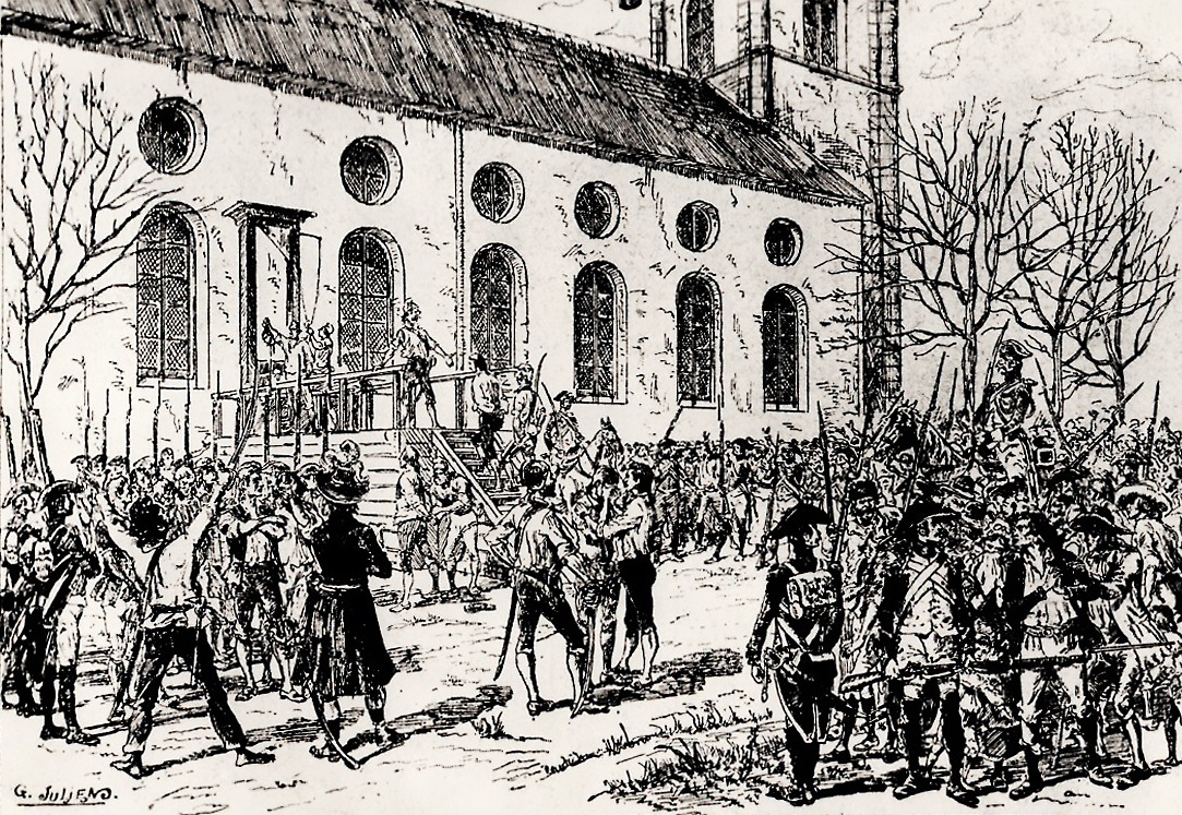 Dessin de la fin du XVIIIème siècle représentant l’exécution à la guillotine sur la place de l'église à Maîche (Doubs, France) de 19 jeunes gens ayant participé à l'insurrection paysanne de la Petite Vendée en 1793.